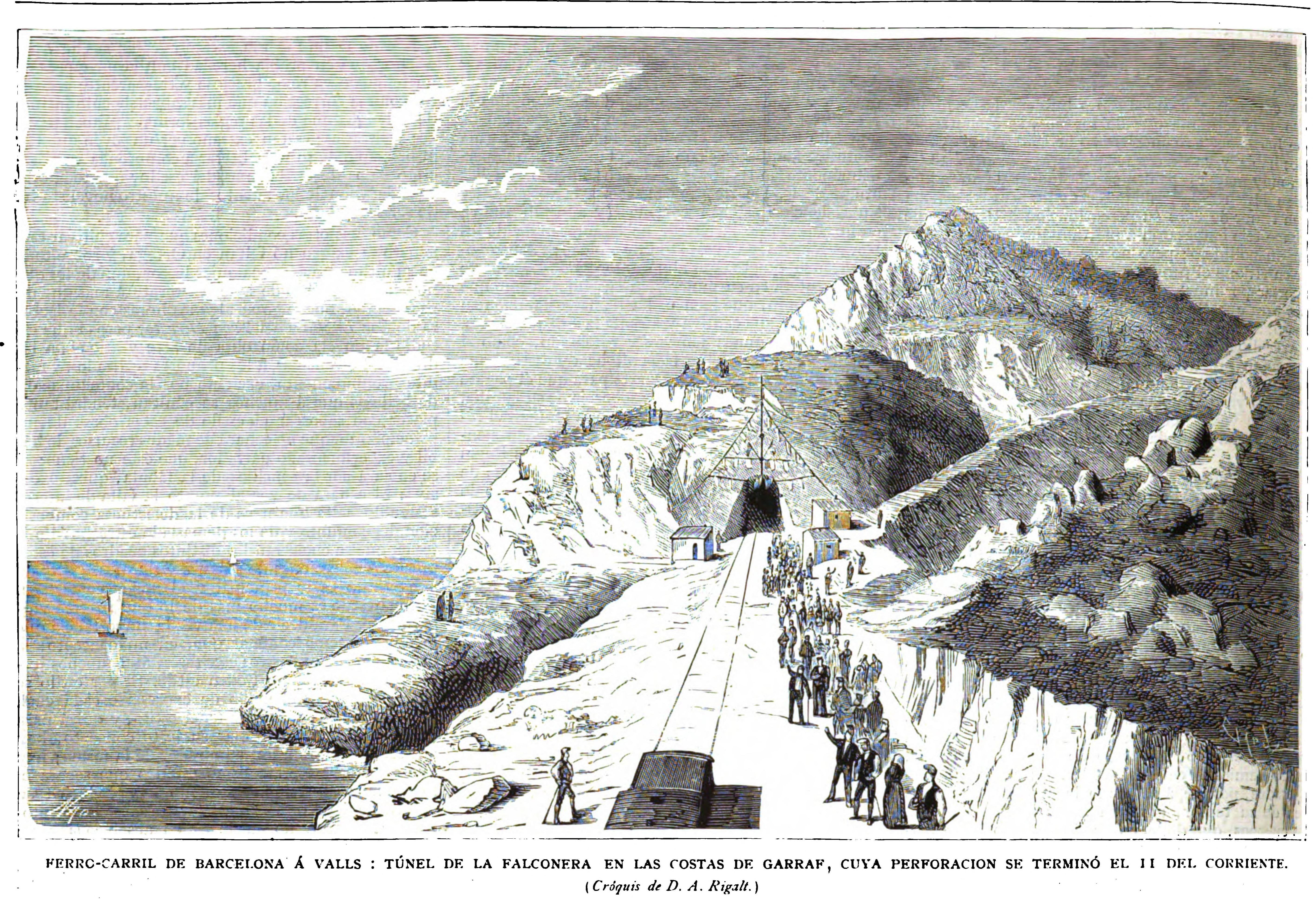 Ferro-carril de Barcelona á Valls, Túnel de la Falconera en las costas de Garraf, cuya perforación se terminó el 11 del corriente (croquis de D. A. Rigalt.